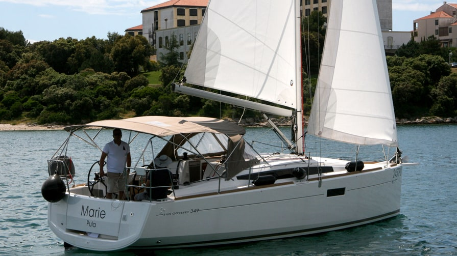 Sun Odyssey bei achterlichem Wind